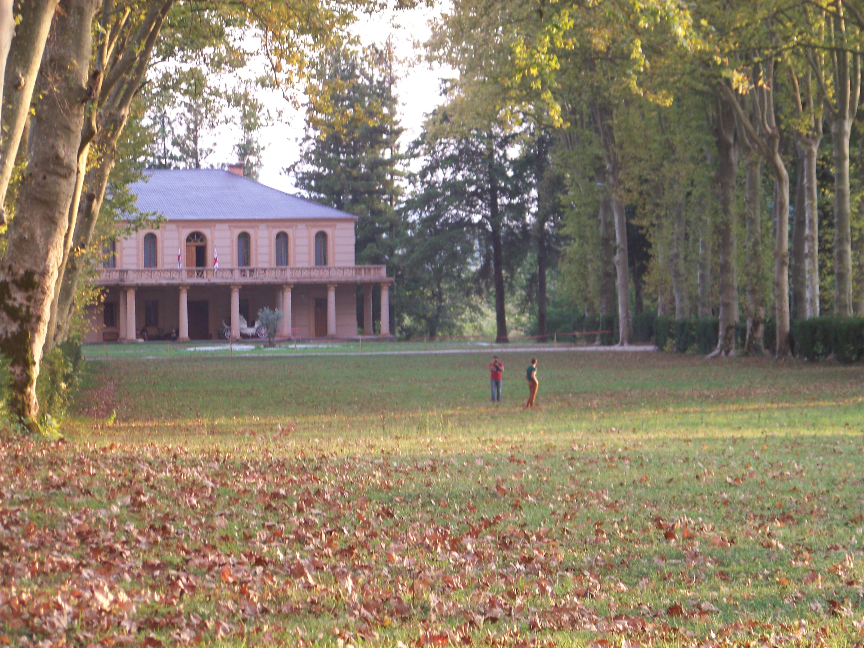 სალხინოს ბაღი